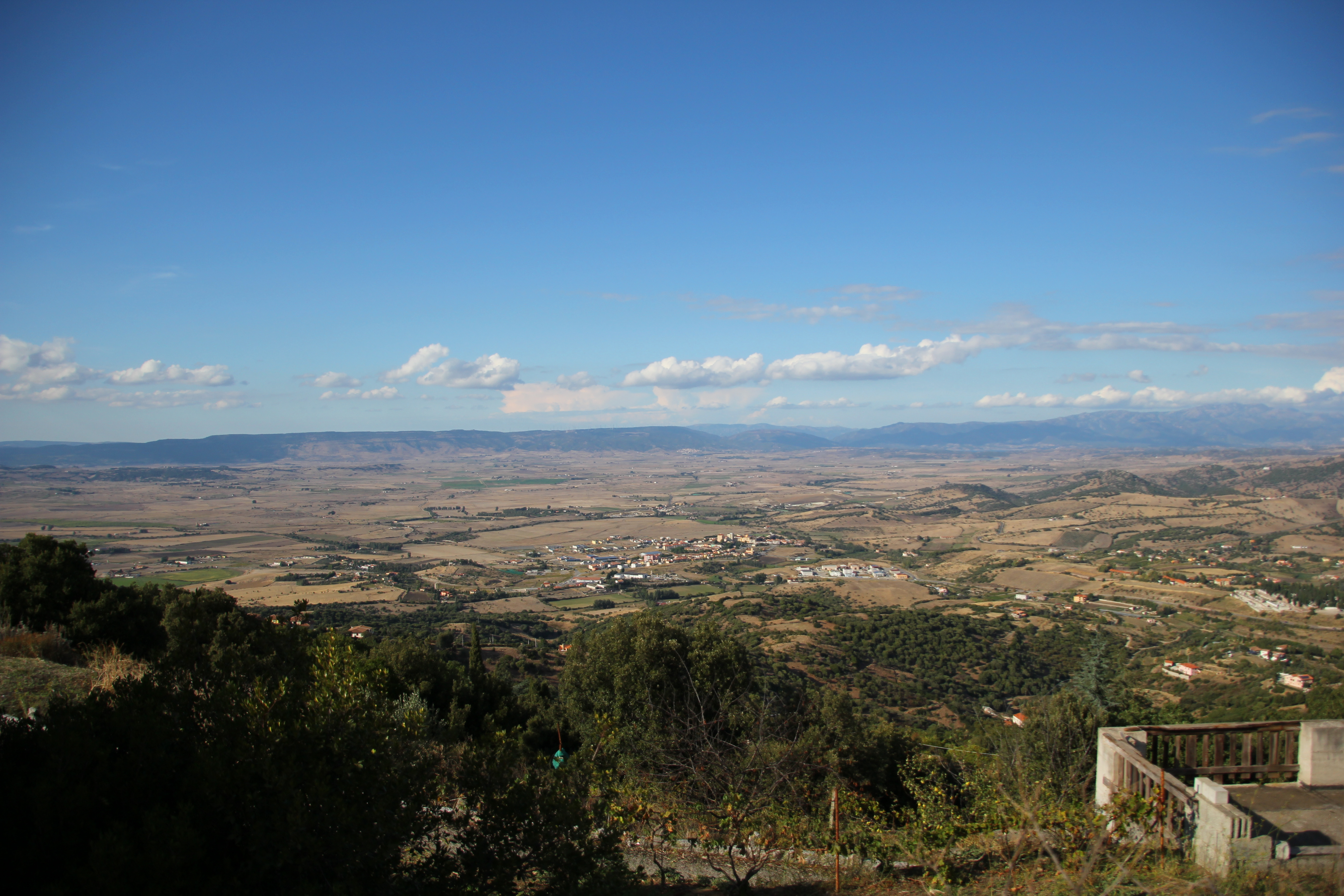 Ozieri - Piana di Chilivani